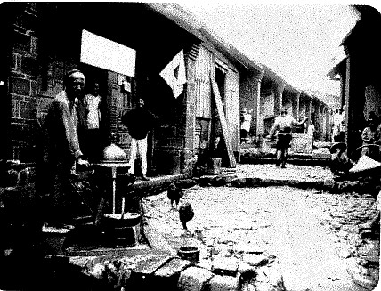 Taiwan Tamsui in 1895